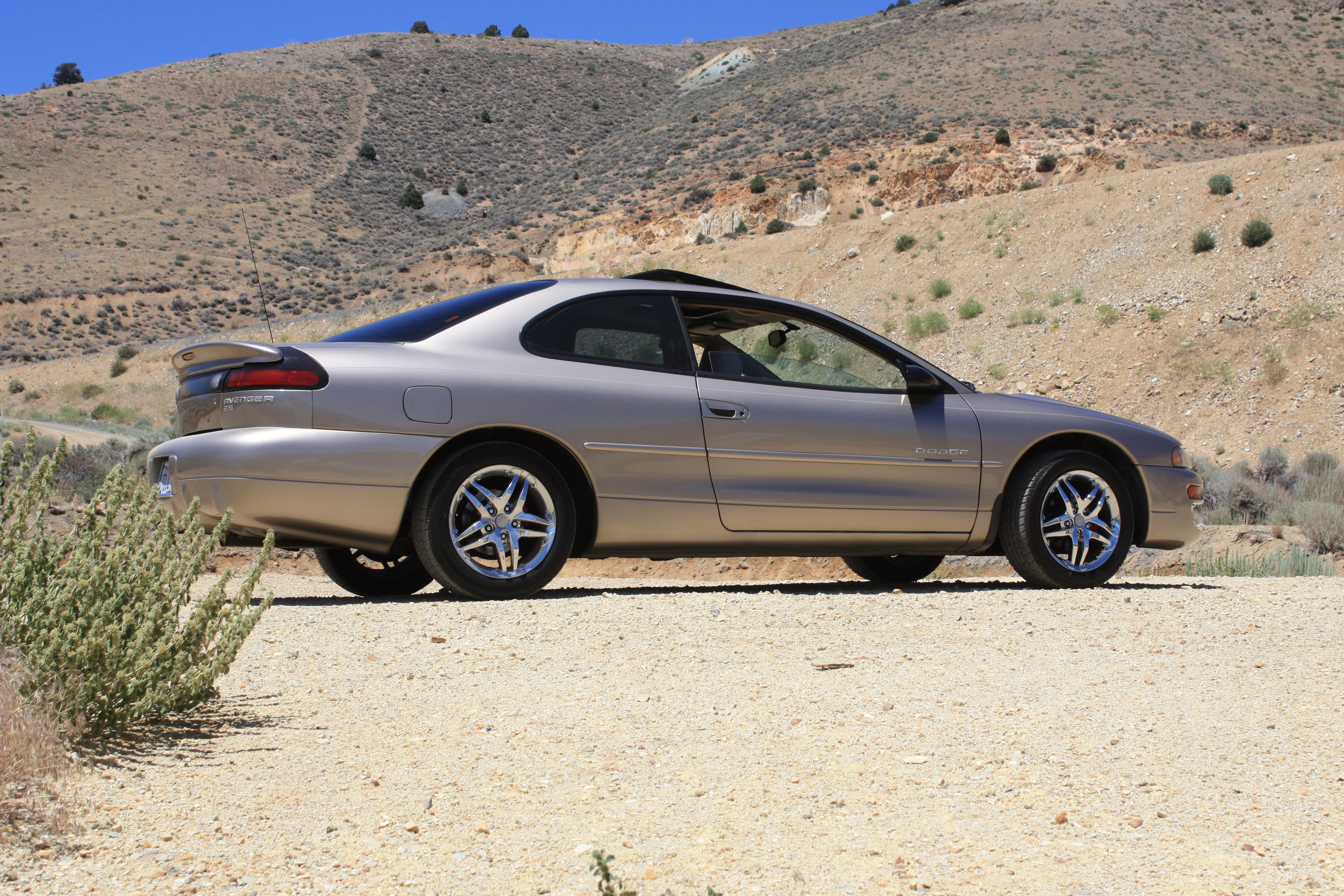 1998 Dodge Avenge, Gold Hill, Nevada.